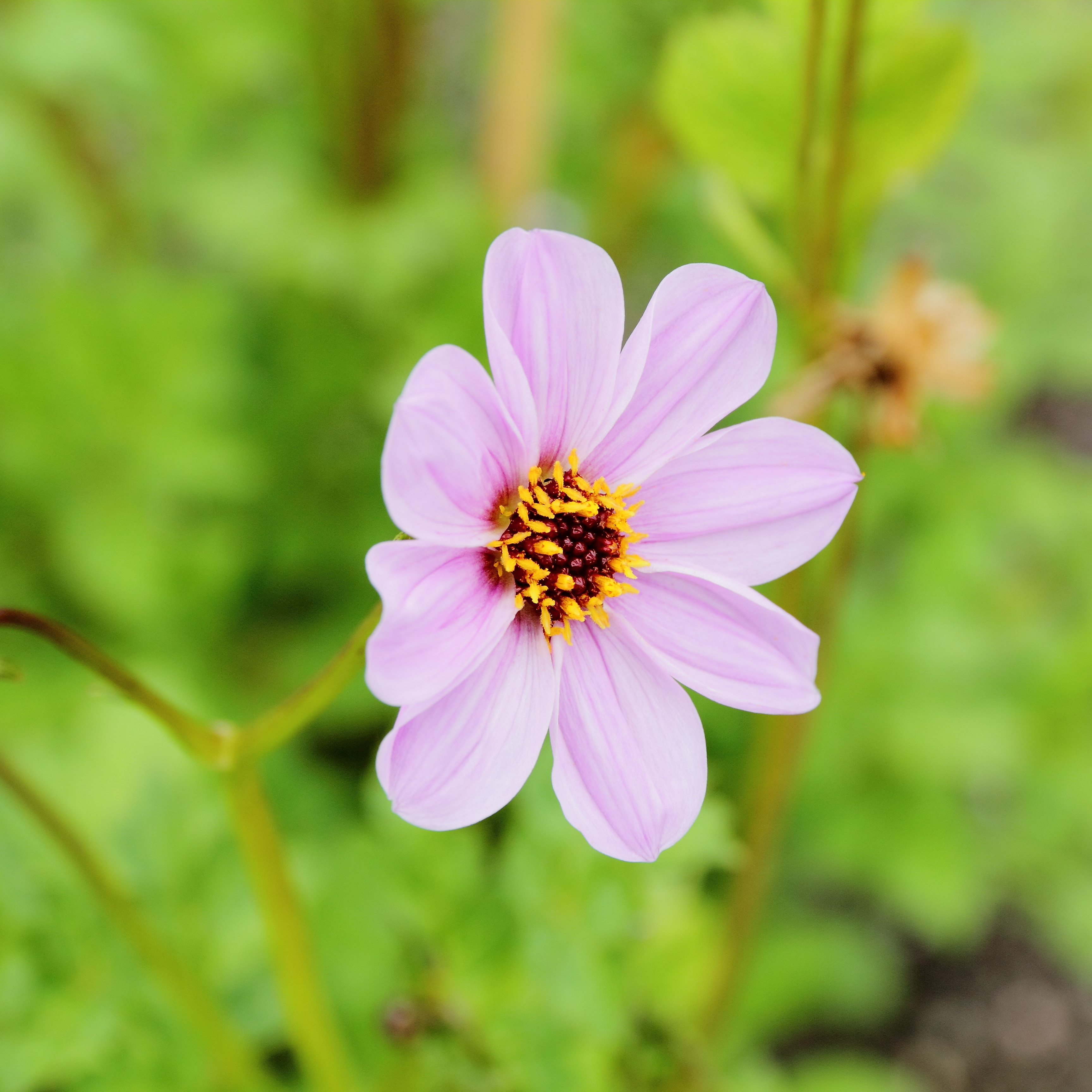 Dahlia merckii i Bergianska trädgården.